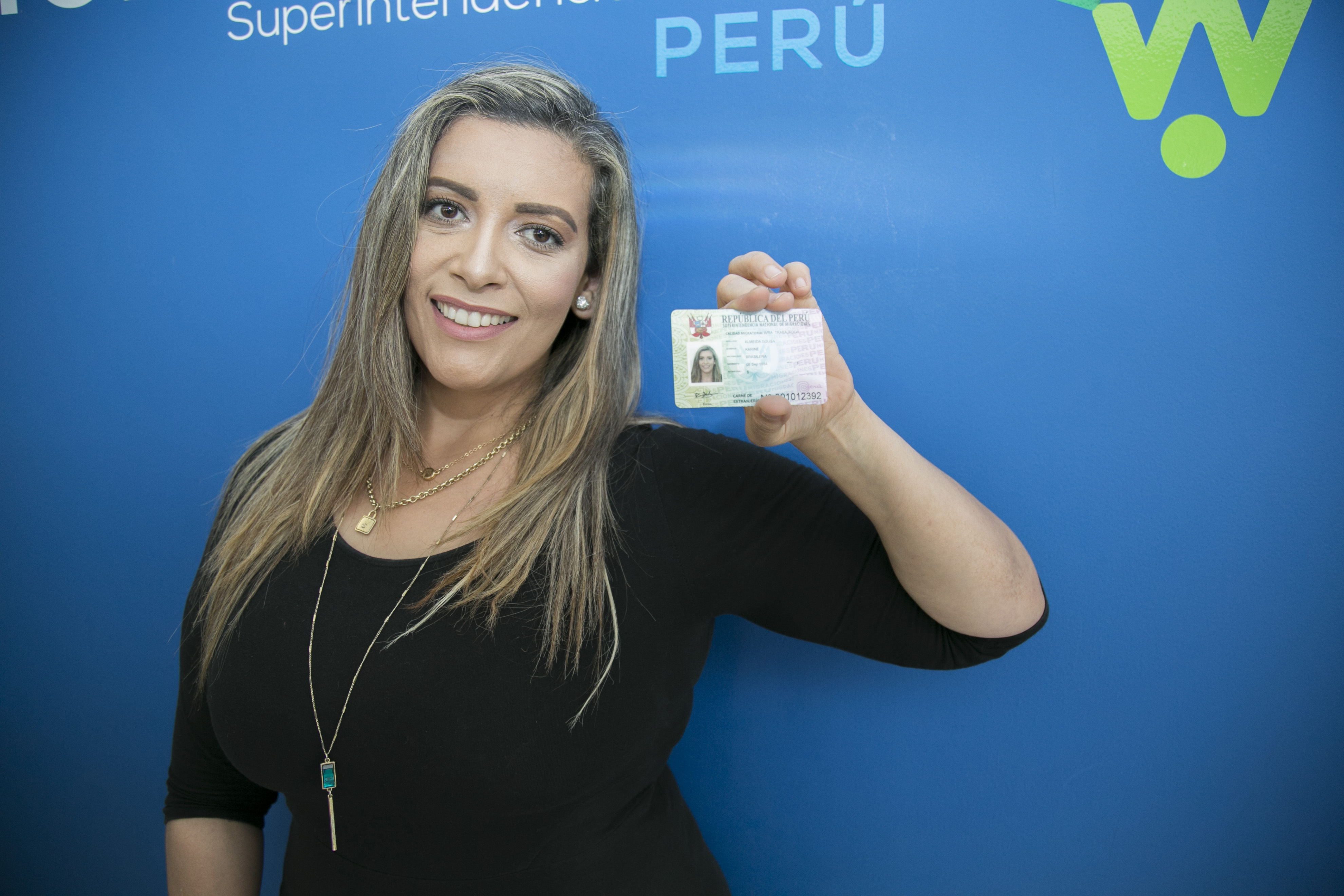 Ciudadana con carné de extranjería